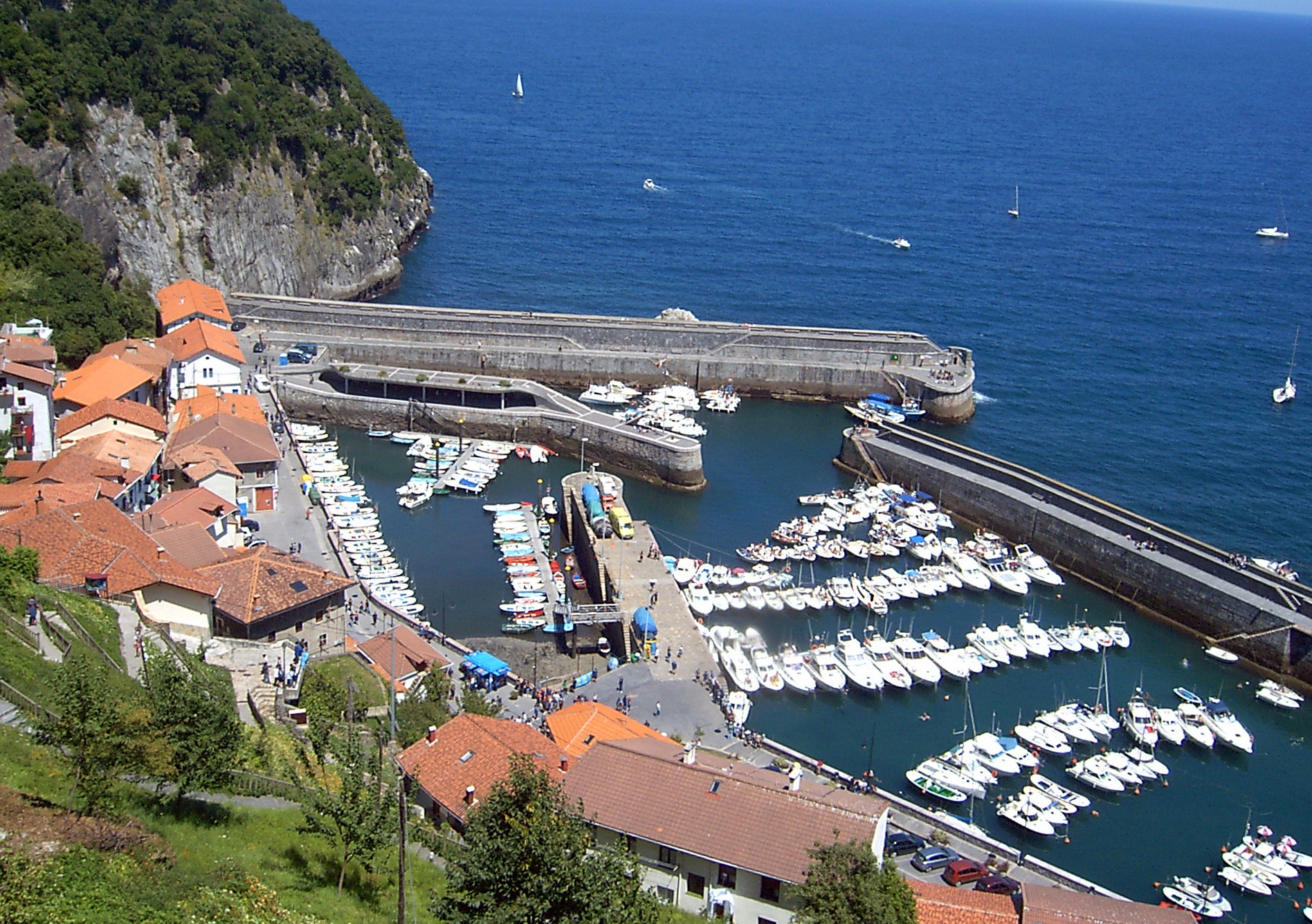 Elantxobeko ikuspegia